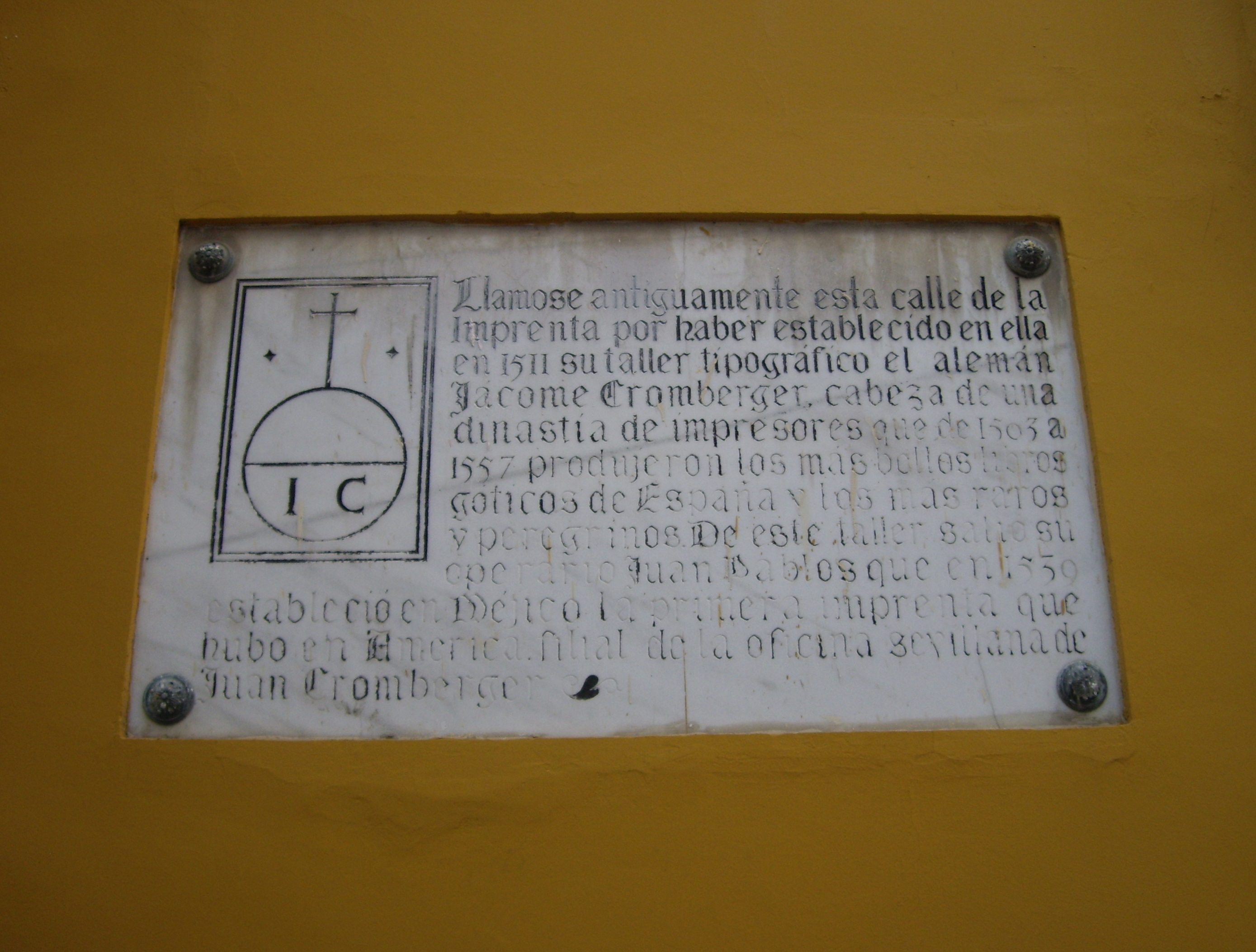 Placa situada en la Calle Pajaritos de Sevilla en la calle donde estuvo la imprenta los Cromberger entre 1511 y 1557